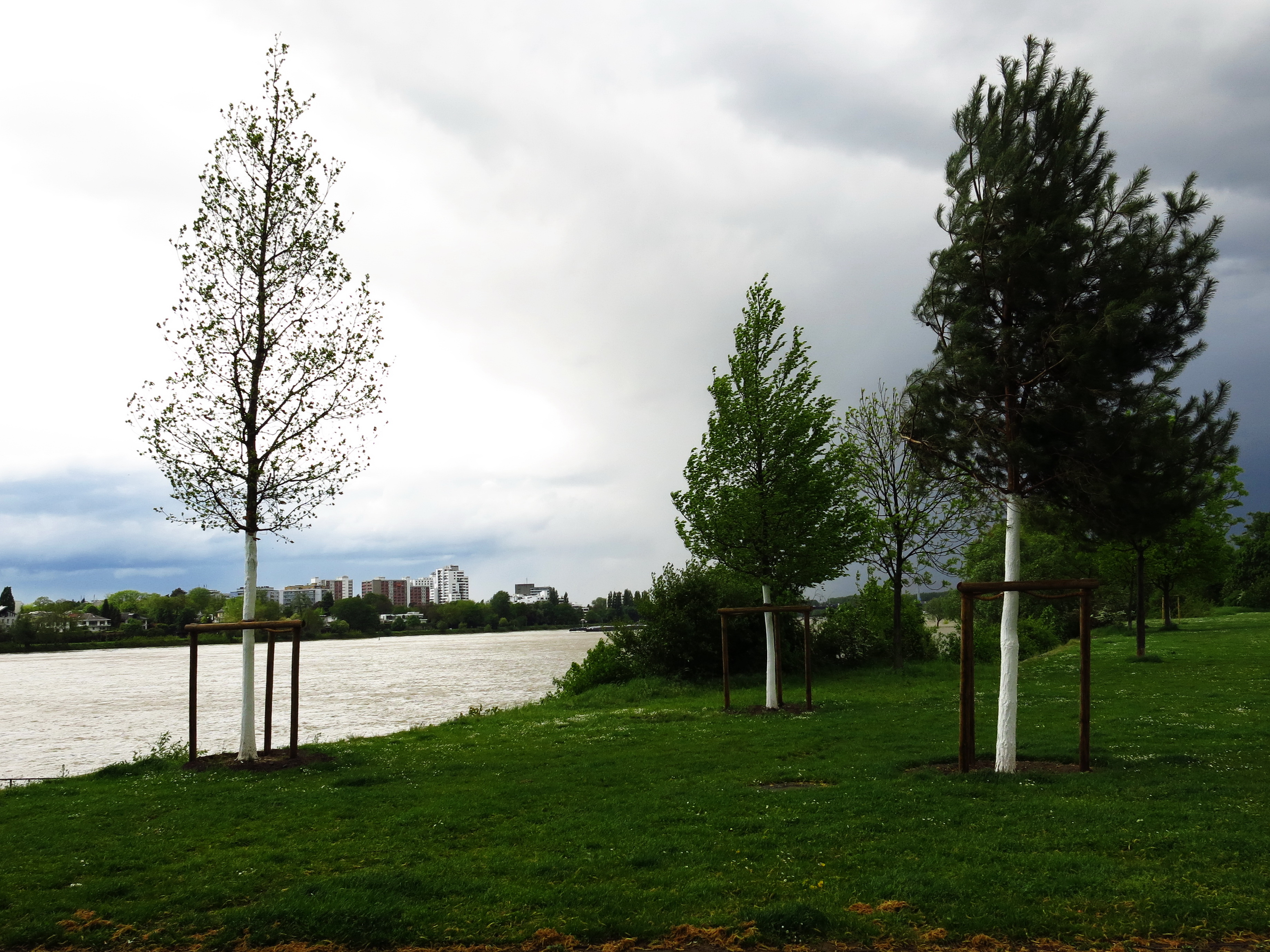 Die Bonner Einheitsbäume am Rheinufer im Ortsteil Beuel.